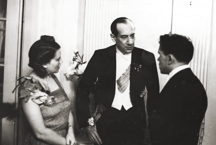 Czerwiec 1939 r. Podczas przyjęcia w ambasadzie ZSRR w Warszawie Beck rozmawia z ambasadorem Szaronowem i jego małżonką. Zdjęcie z tygodnika Światowid.